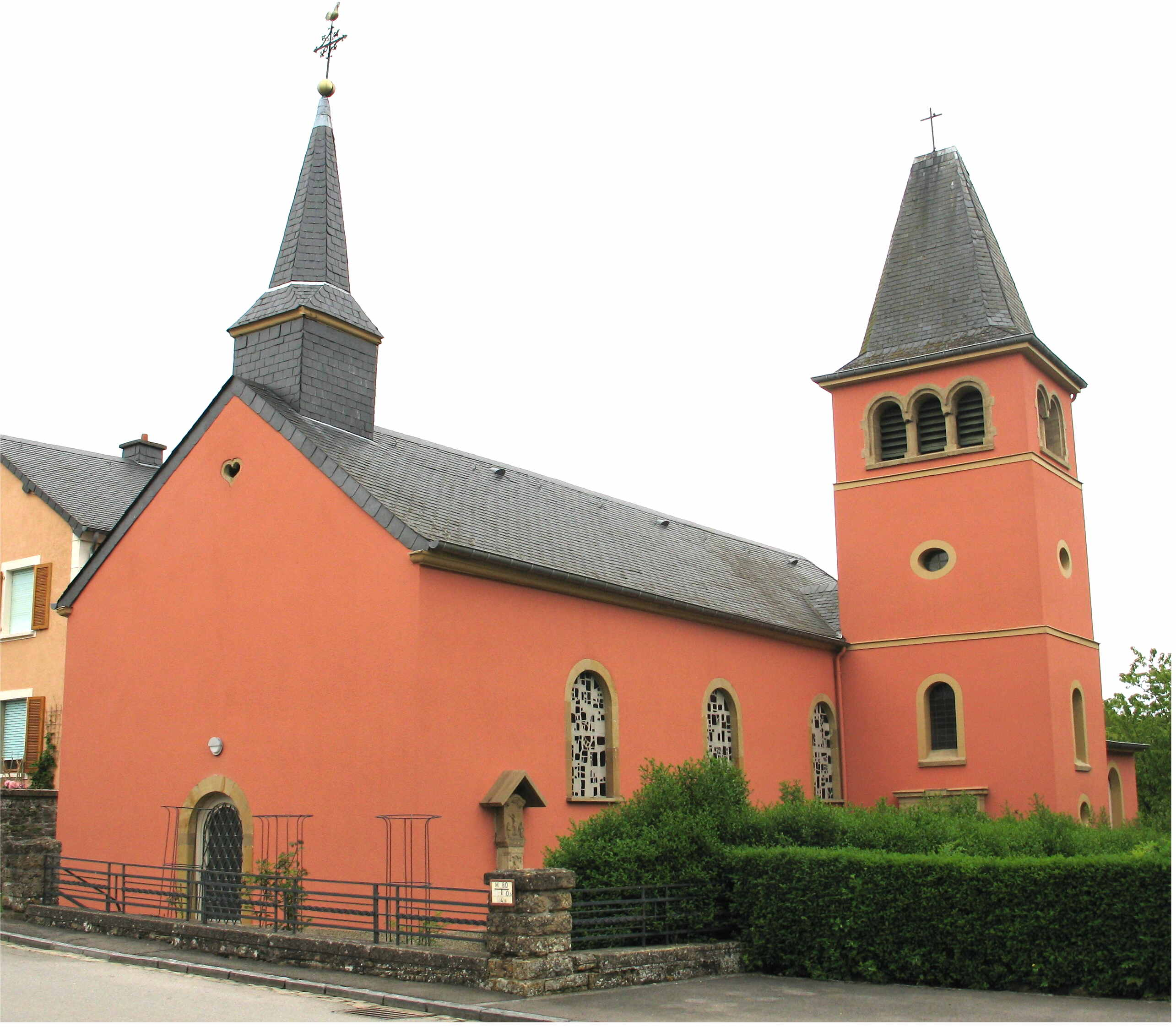 Kierch vu Reiland Reiland Kategorie:Gemeng Hiefenech